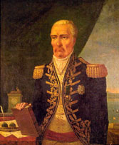 Retrato de António Teixeira Rebelo exposto na Biblioteca Nobre do Colégio Militar